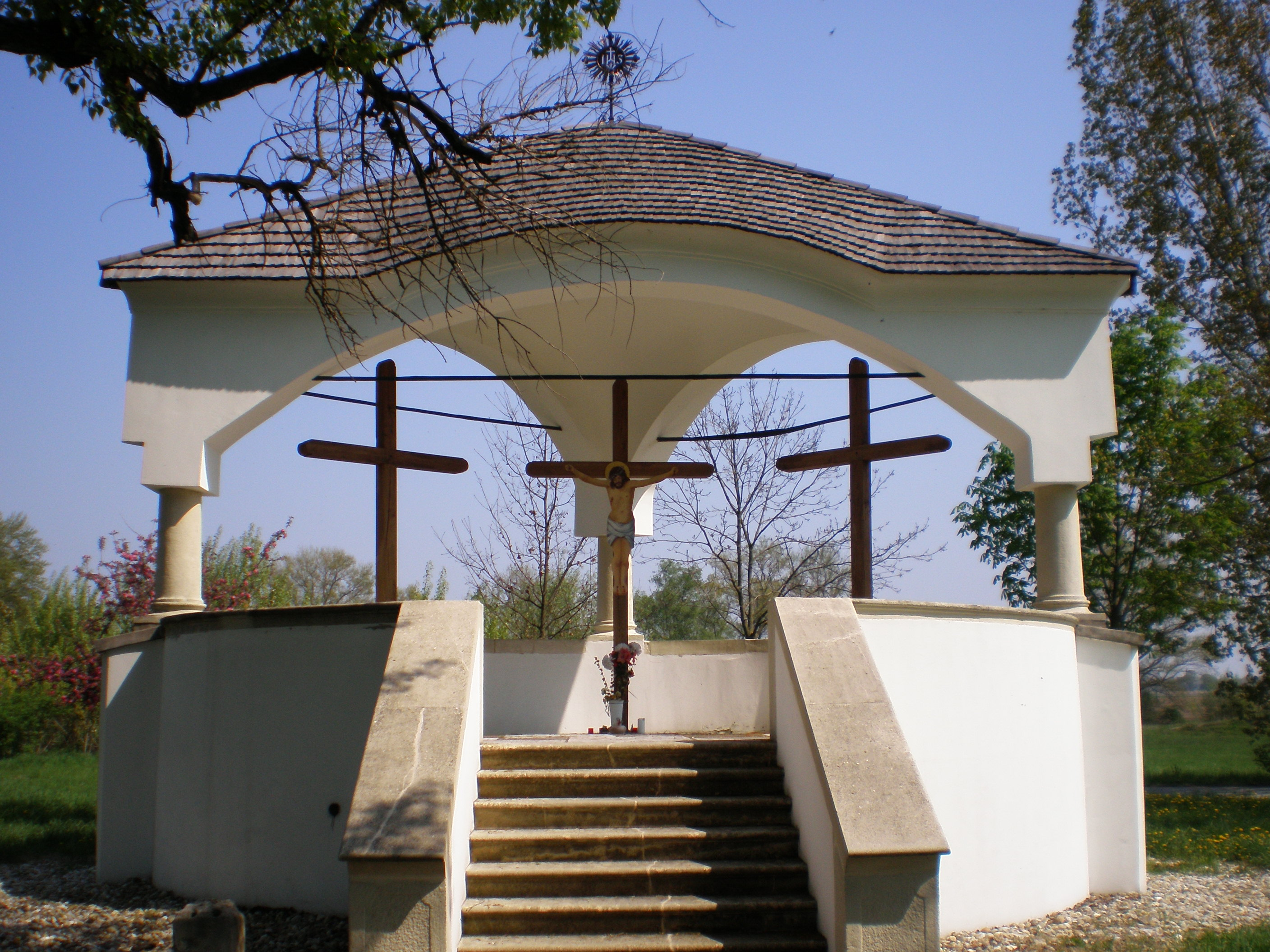 Kálvária a település határában